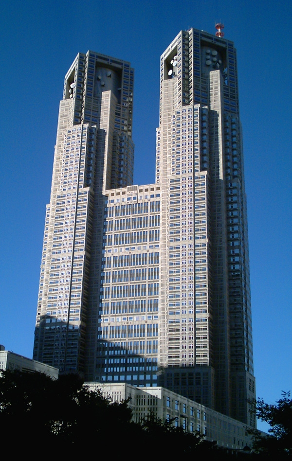 TokyoTocho_Office_Building_Shinjuku Tokyo Japan